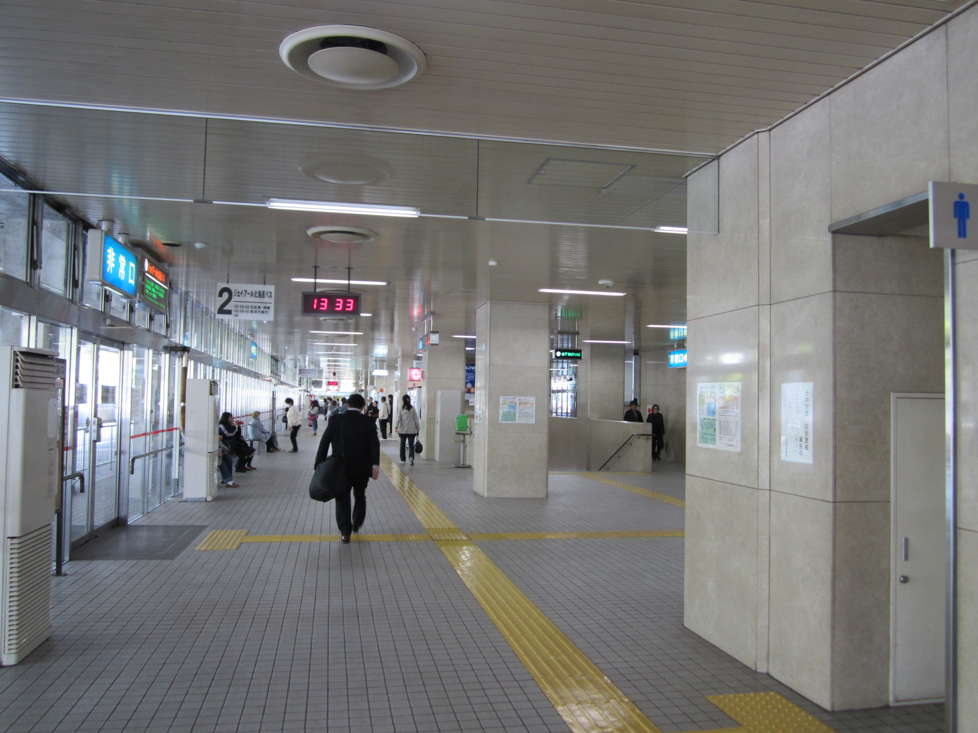 大谷地バスターミナル内の様子（2012年5月）